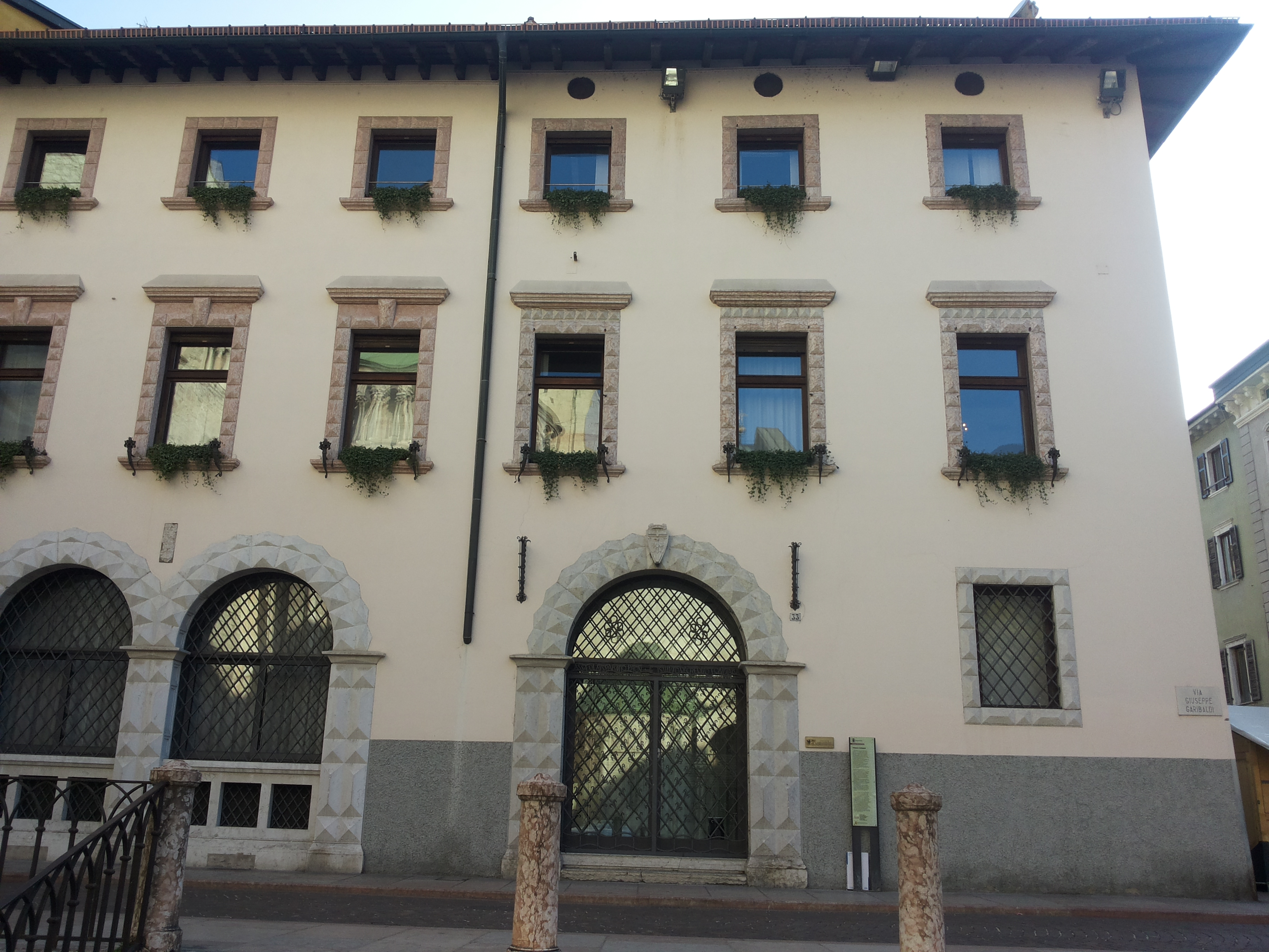 Palazzo Calepini a Trento